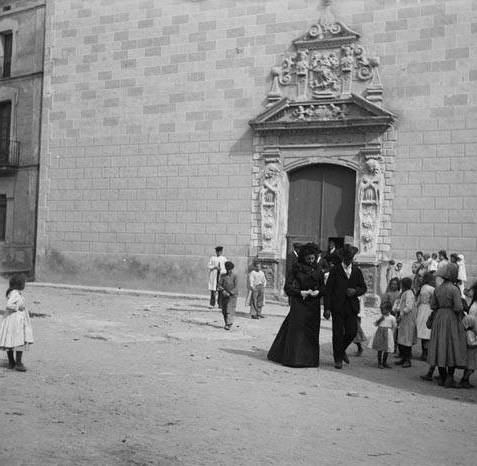 Imatge